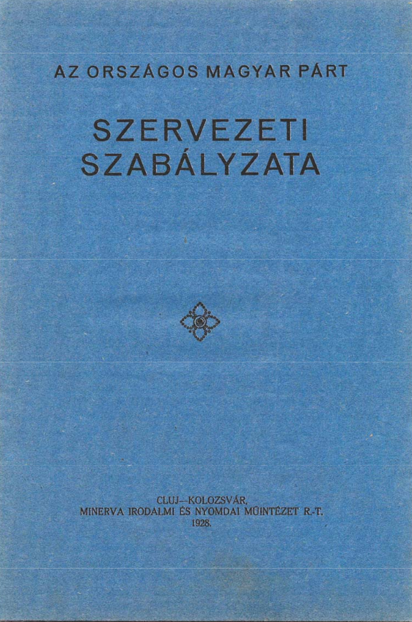 Országos Magyar Párt Szervezeti Szabályzata, 1928.